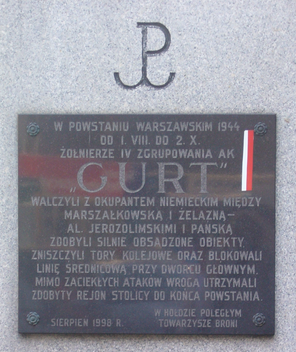 Tablica upamiętniająca walki zgrupowania AK Gurt na rogu ulicy Złotej i aleji Jana Pawła II